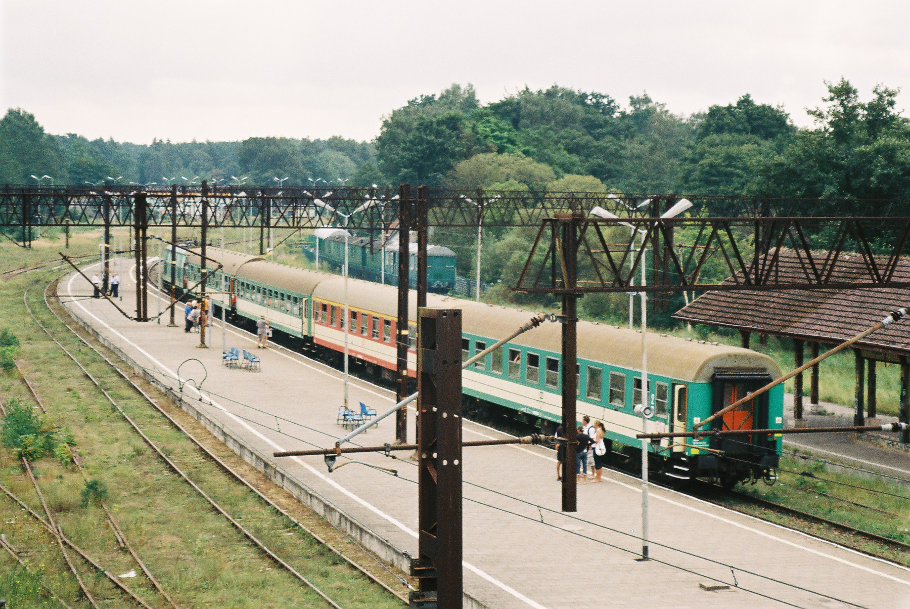 Stacja kolejowa w Ustce